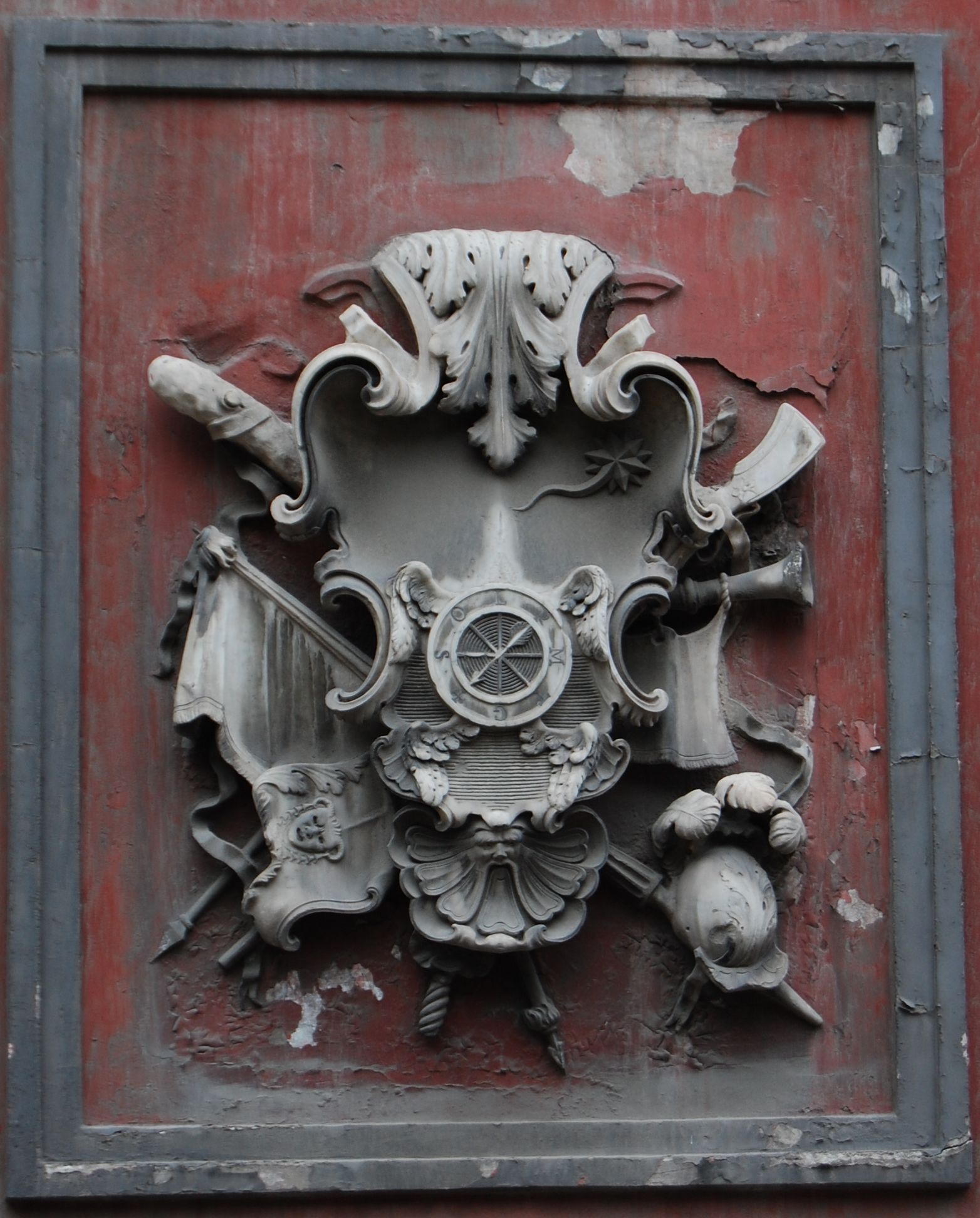 Caserma Tofano, via Solimena, Nocera Inferiore, stemma sulla facciata